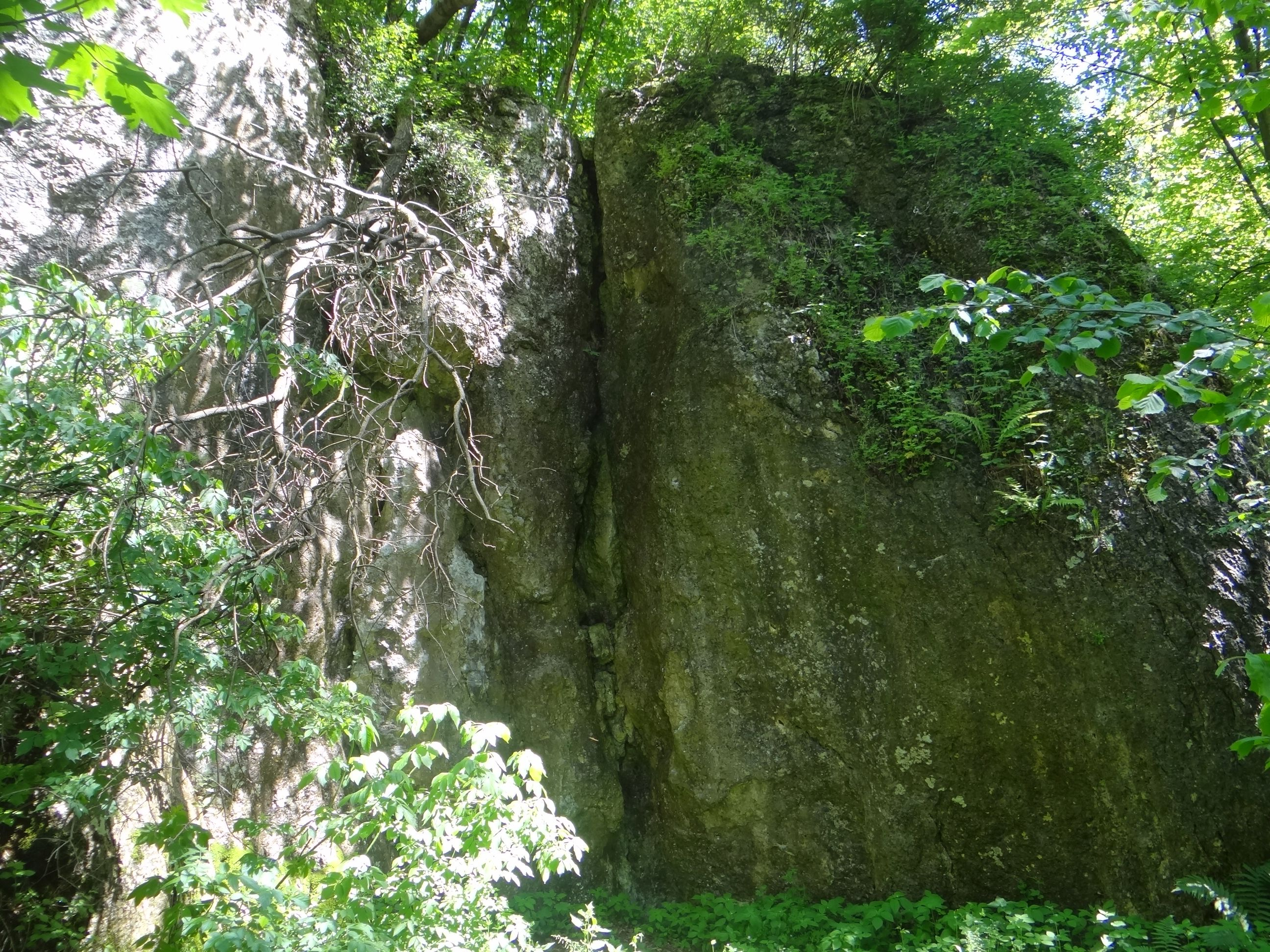 Leszczynowa Skała w grupie Węzich Skał w Dolinie Brzoskwini